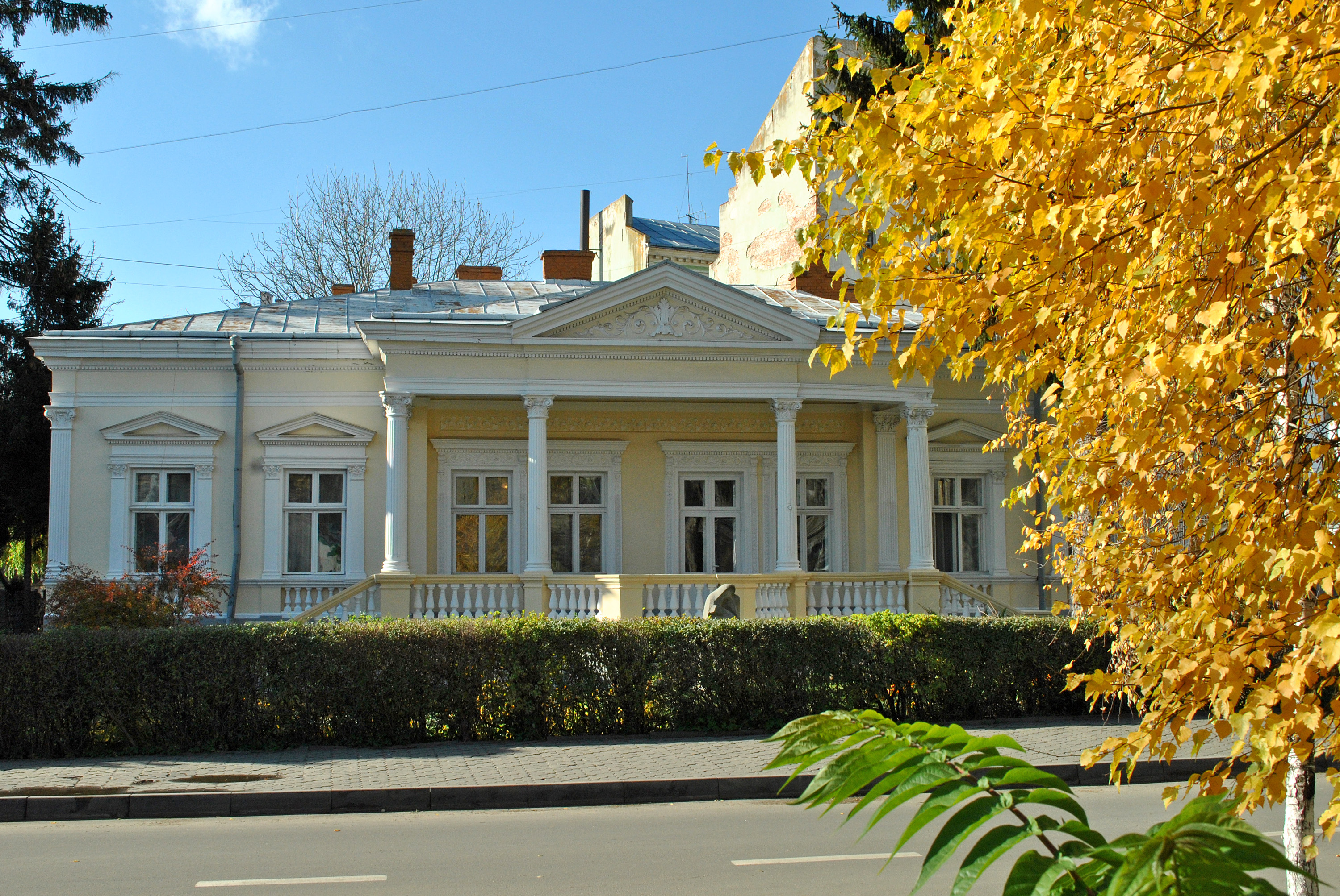 Пам'ятка архітектури місцевого значення на вул. І. Франка, 21 у Тернополі: житловий будинок (мурований), «Вілла Грабовських». Нині — приміщення бібліотеки № 2 для дітей і бібліотеки-музею «Літературне Тернопілля».